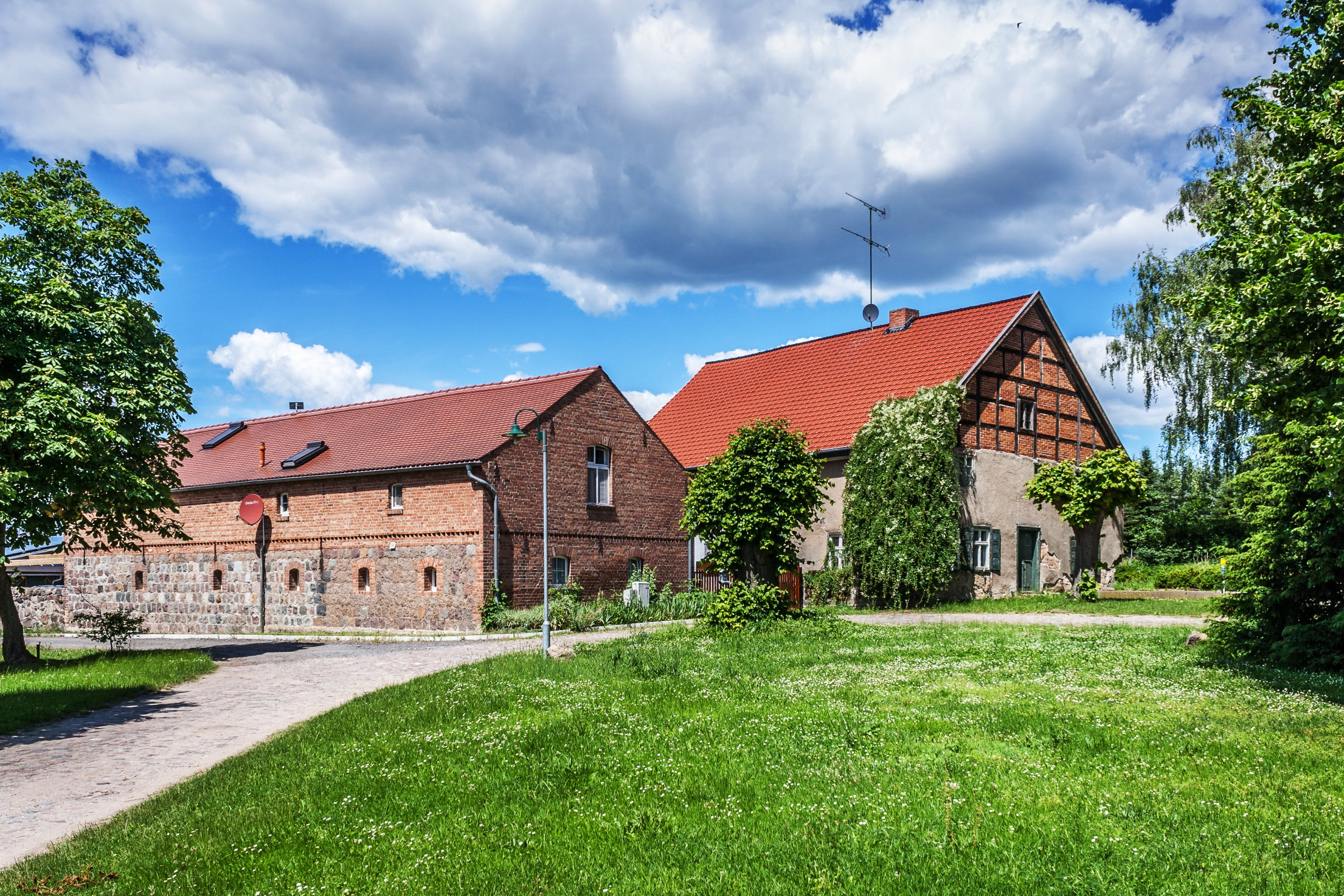 Bölkendorfer Strasse 6